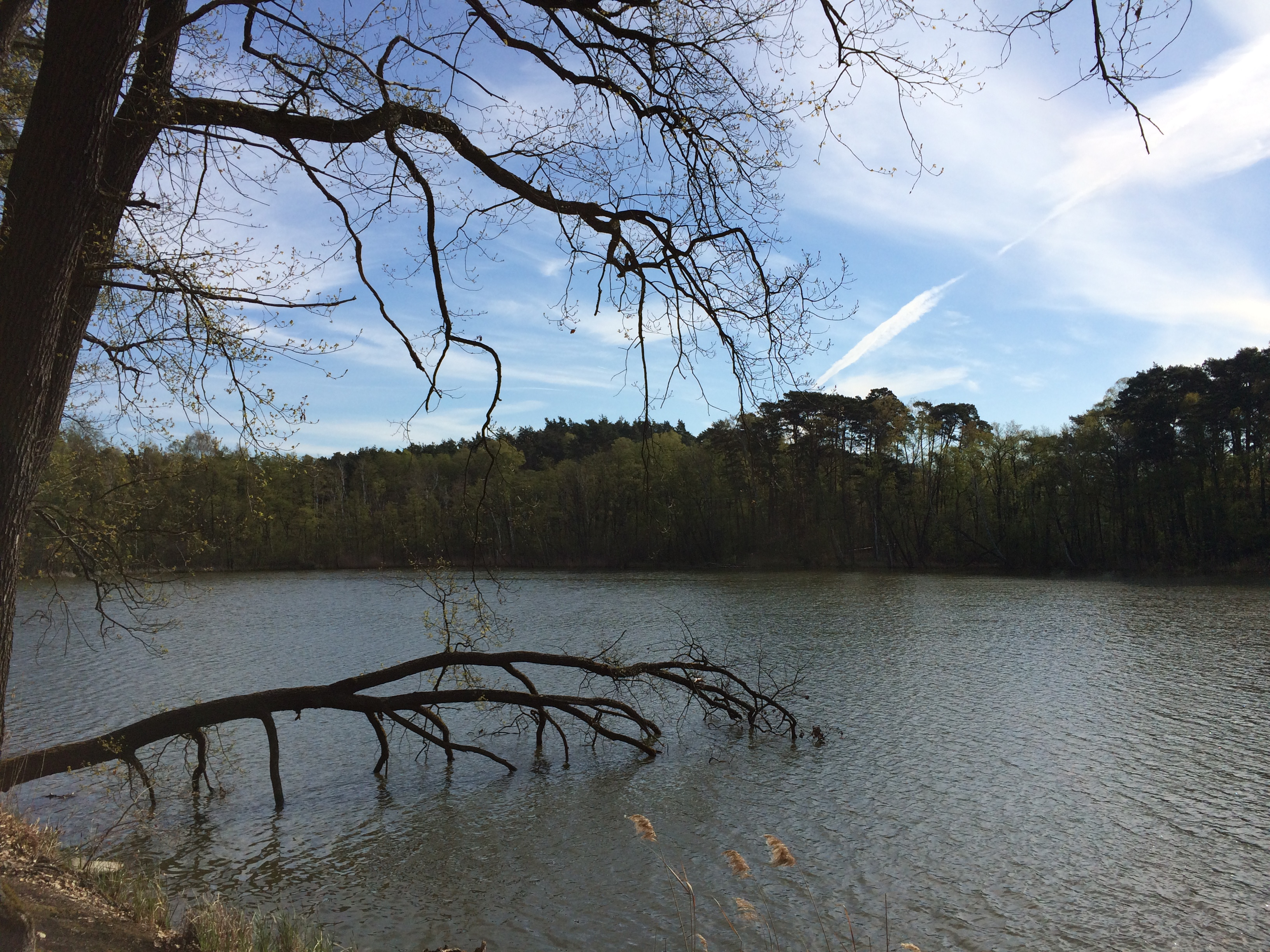 Die Heideseen bilden eine Seenplatte südlich des Ortsteils Köthen in Märkisch Buchholz, Brandenburg